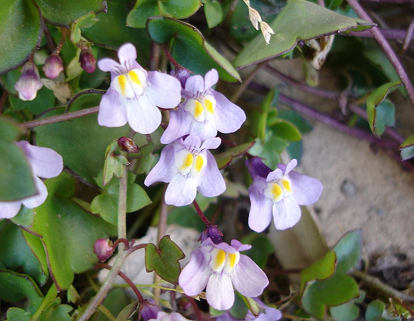 Cymbalaria muralis (cymbalaire des murs) Photo prise à Camélas en mars 2005 Jean Tosti 2005